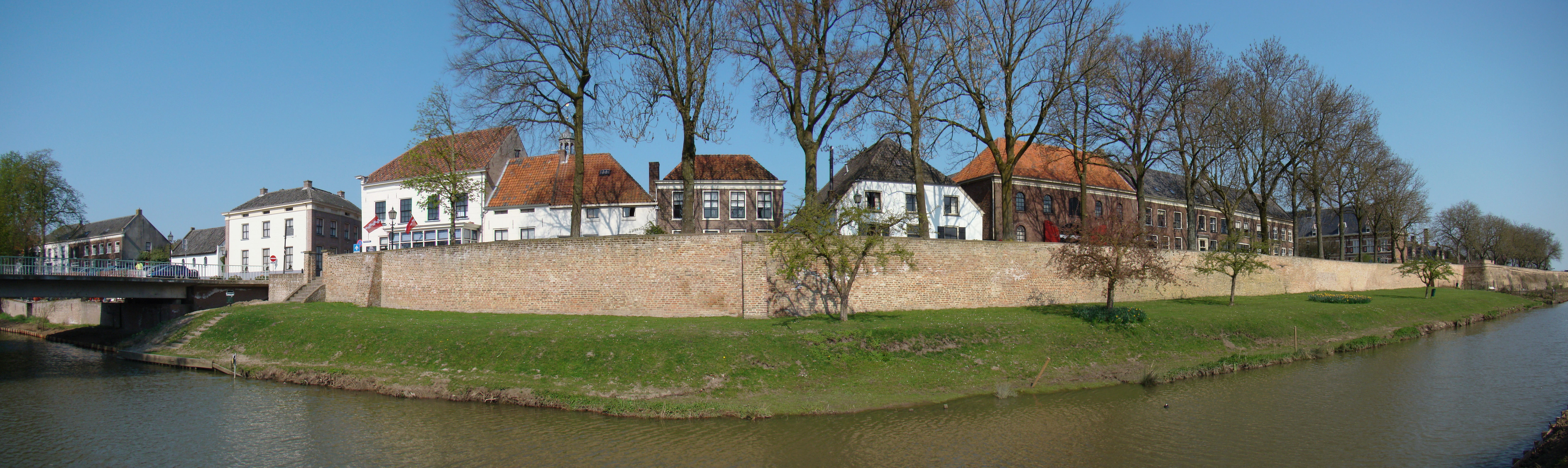 Zicht op een deel van de stadswal, deel van de vestingwerken, in Buren